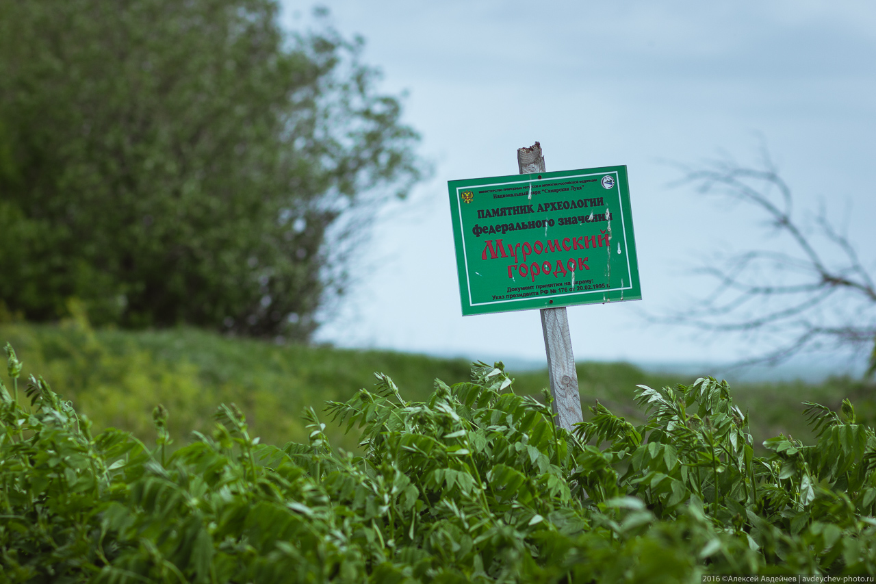 Археологический памятник Муромский городок, Самарская Лука, Россия